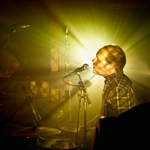 Eivind Aase i Ni Liv på Skogen Gård i Bø, 5.5.2012.